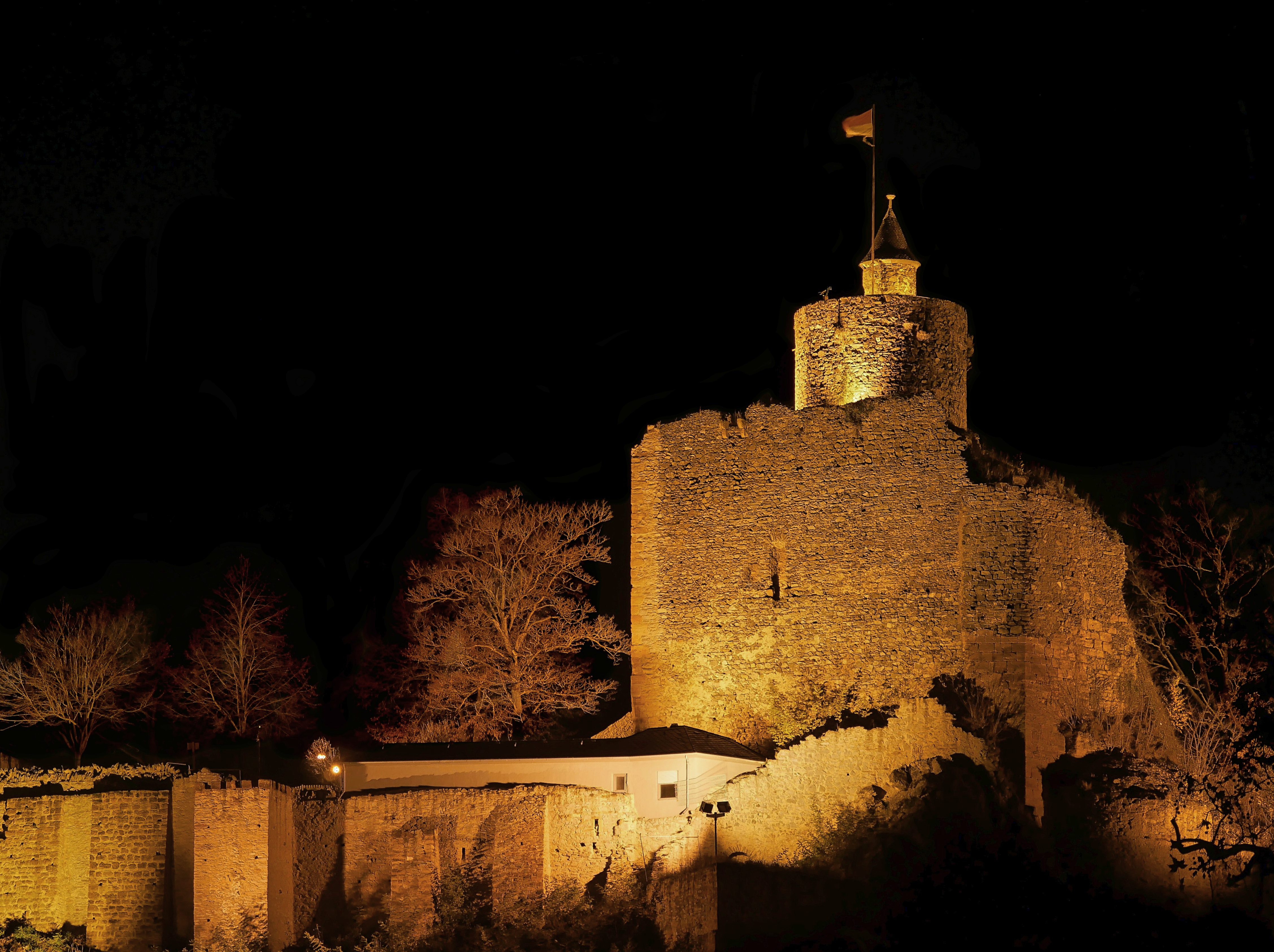 Saarburg (Kreis Trier-Saarburg) Burgruine der Saarburg von Osten, erzbischöfliche Burg; Höhenburg, Gründung im 10. Jahrhundert, Ausbau im 13. und 14. Jahrhundert, im 18. Jahrhundert Ruine, Sicherung in den 1890er Jahren; unterer Burghof und oberer Burghof, Ring- und Böschungsmauern, Burghaus (14. Jahrhundert), romanisches Turmhaus (12. Jahrhundert); mit Umgebung